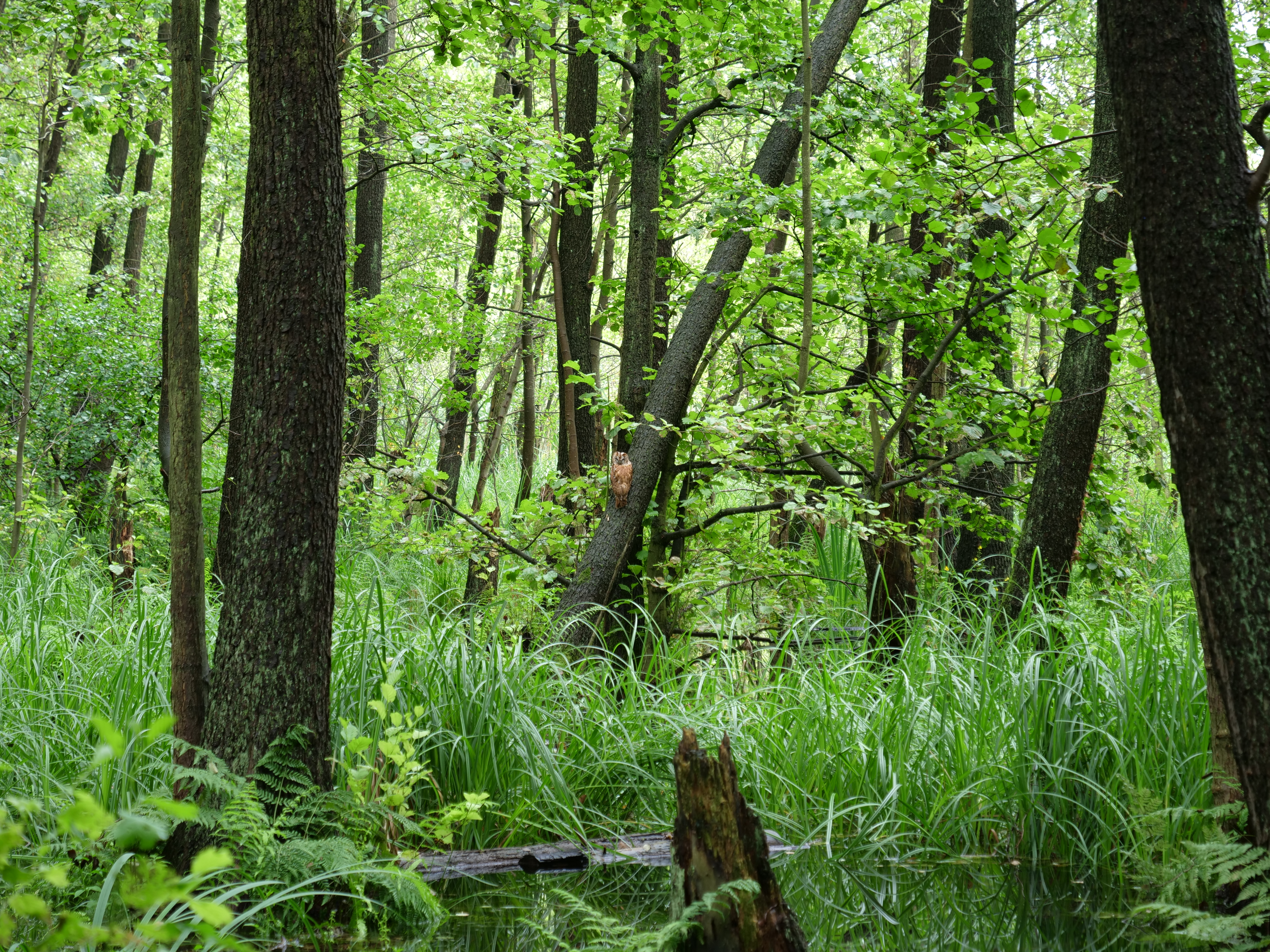 Waldkauz auf einem Baum im Teufelsbruch.